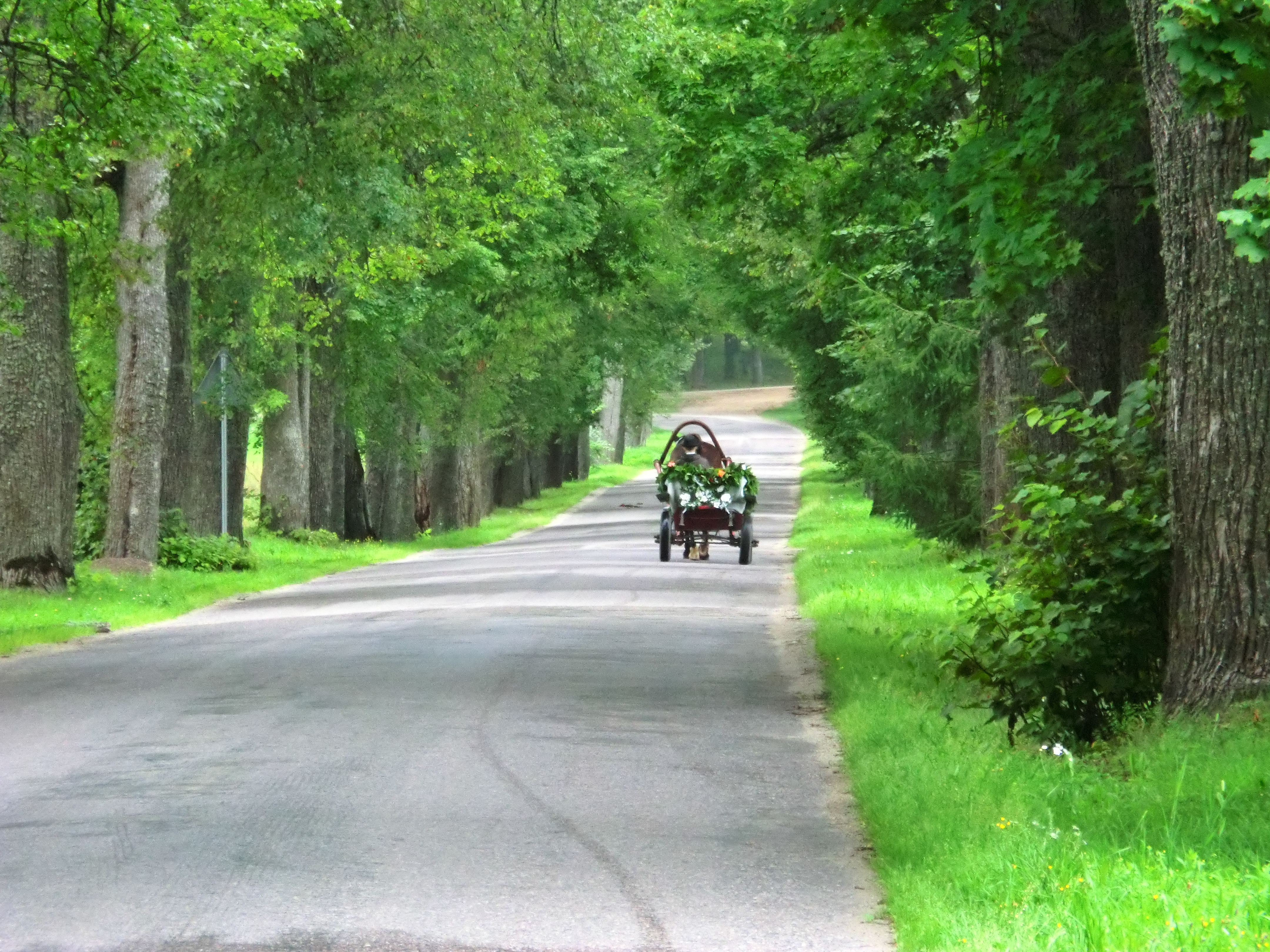 Vecstāmeriena, Stāmerienas pagasts, LV-4406, Latvia